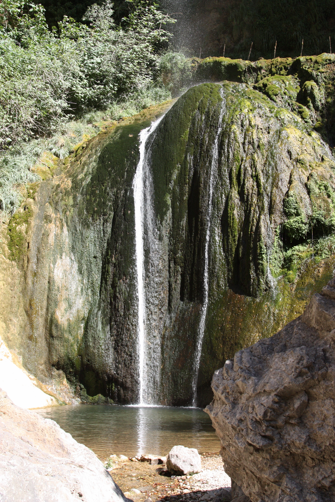 Cascade de Courmes